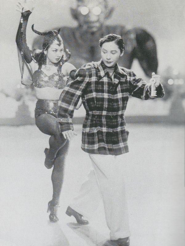 『花くらべ狸御殿』における水の江瀧子と京マチ子。